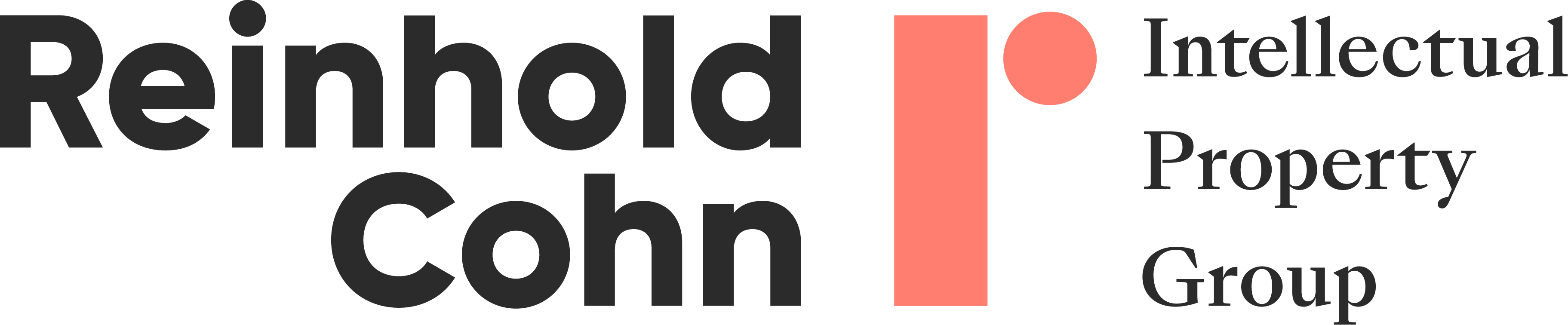 לוגו קבוצת ריינהולד כהן